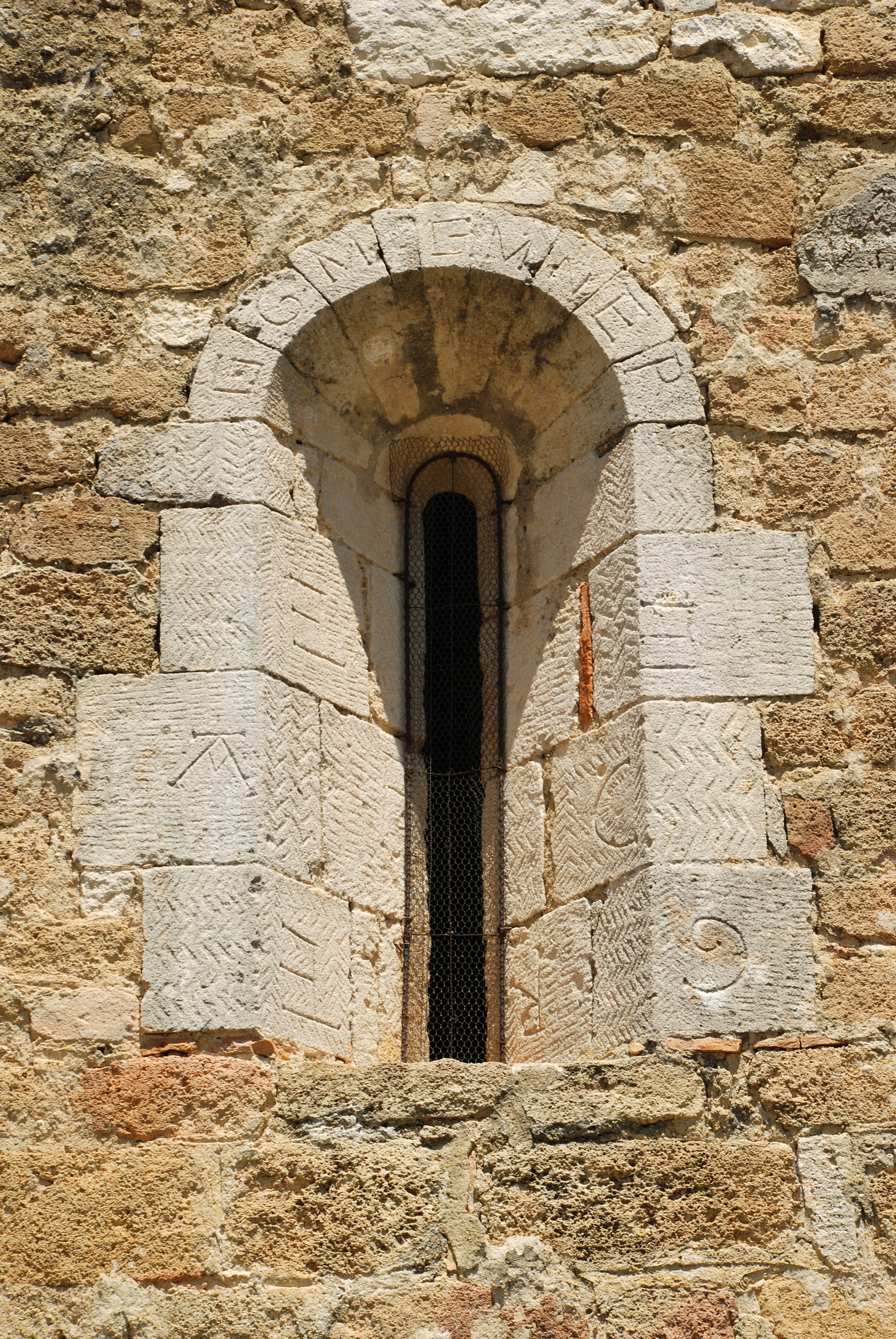 France - Drôme - Église Saint-Pierre-ès-Liens de Colonzelle